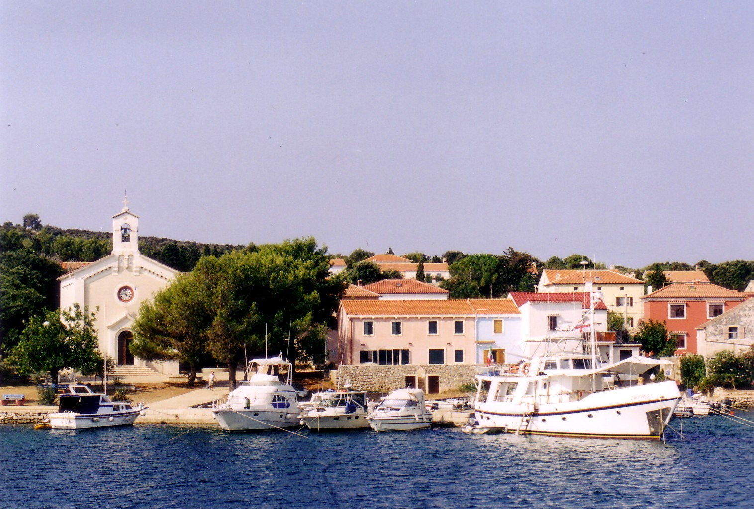 Beschreibung: Ilovik, Kroatien. Quelle: eigene Aufnahme am 16. August 2003 Fotograf: Roman Klementschitz, Wien (für die GNU FDL)